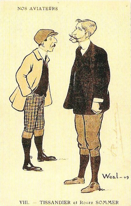 Sommer et Tissandier dessinés par Weal.